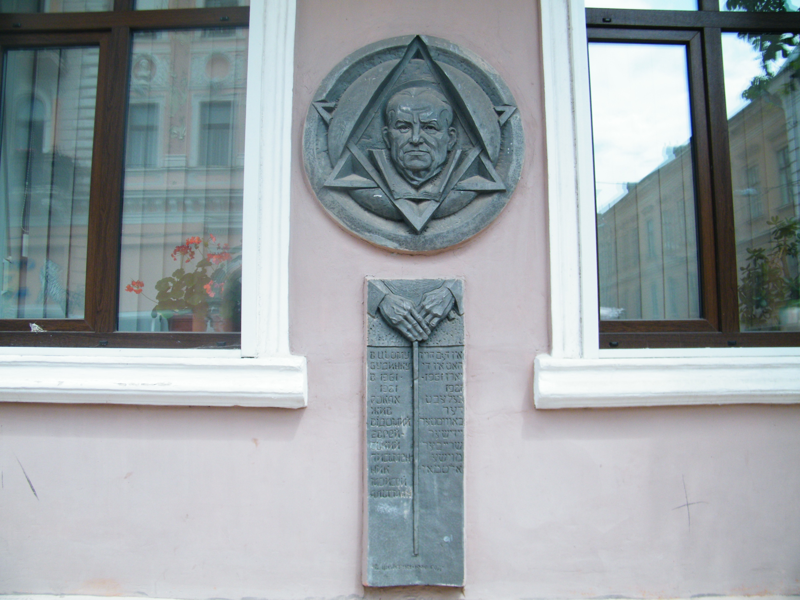 Барельєф Мойсея Альтмана, на будинку, де він жив, по вулиці Ольги Кобилянської у Чернівцях